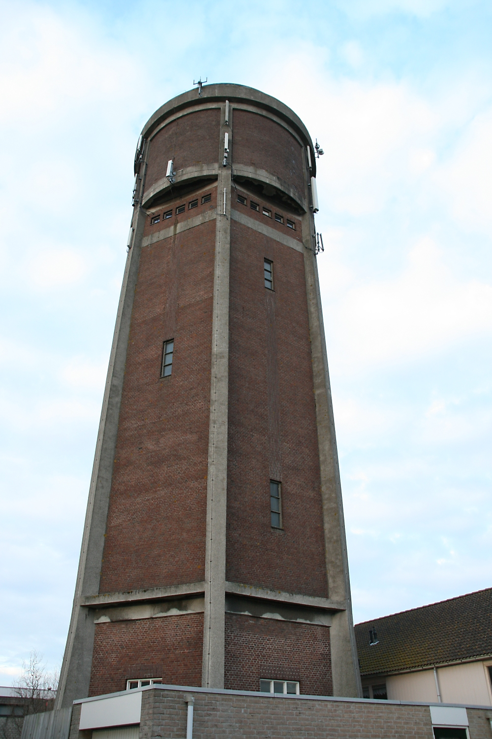 Klaaswaal: watertoren van dichtbij